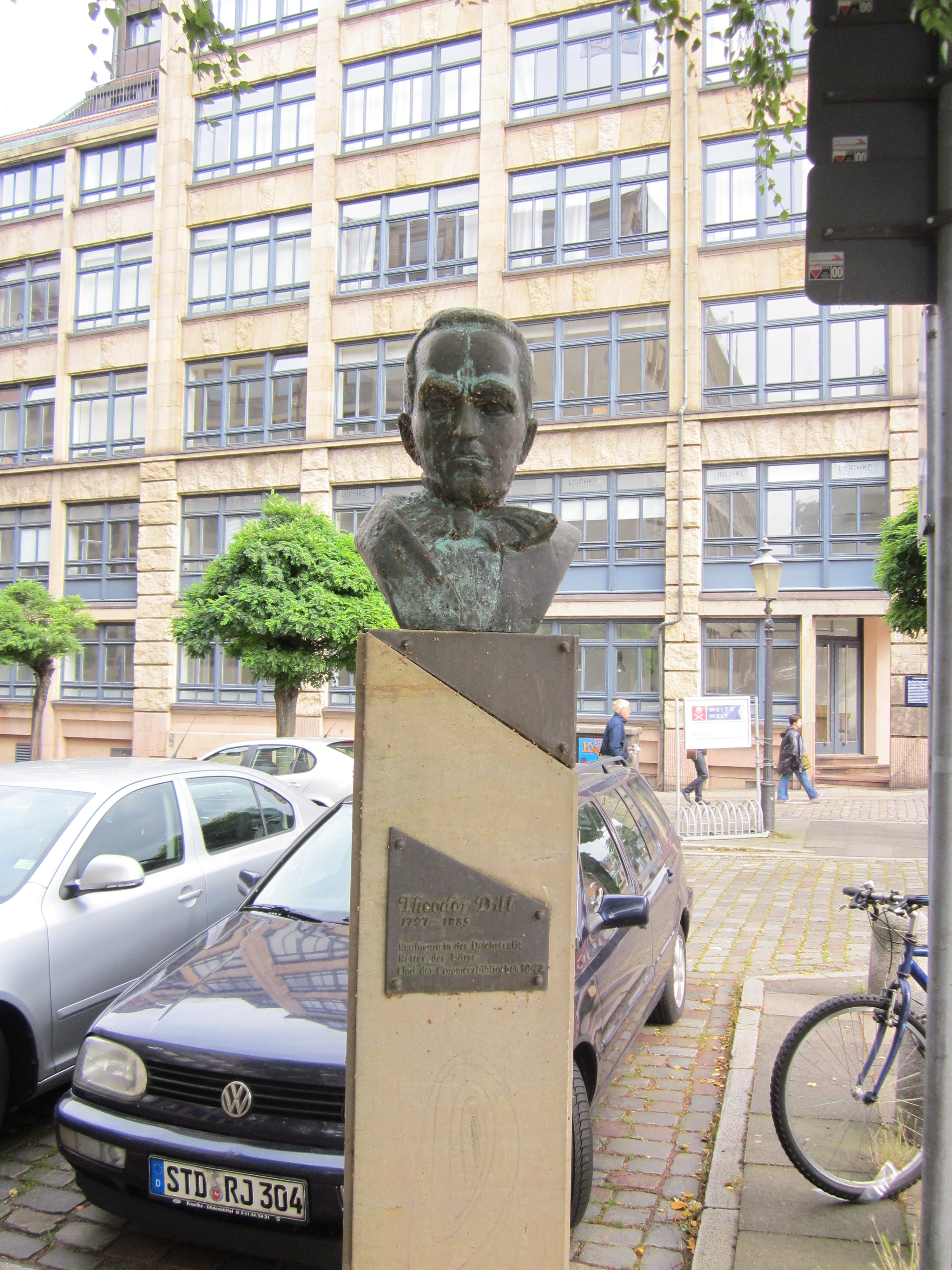 Büste von Theodor Dill (1797-1885) am Kajen, westlich der Deichstraße, in der Hamburger Altstadt. Dill war Kaufmann in der Deichstraße und im Kalenderjahr 1846 Präses der Handelskammer. Während des Hamburger Brandes war ihm die Rettung von Börse und Commerzbibliothek zu verdanken. Die Büste wurde vom Verein rettet die Deichstraße gestiftet.